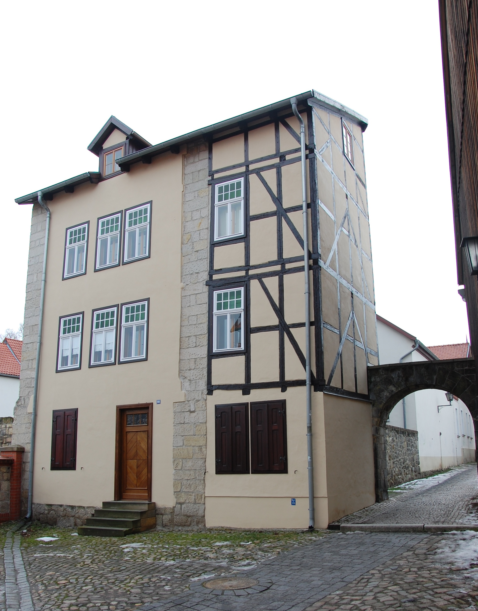 Haus Kaiserstraße 33 in Quedlinburg